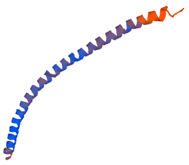 Synaptobrevin VAMP2